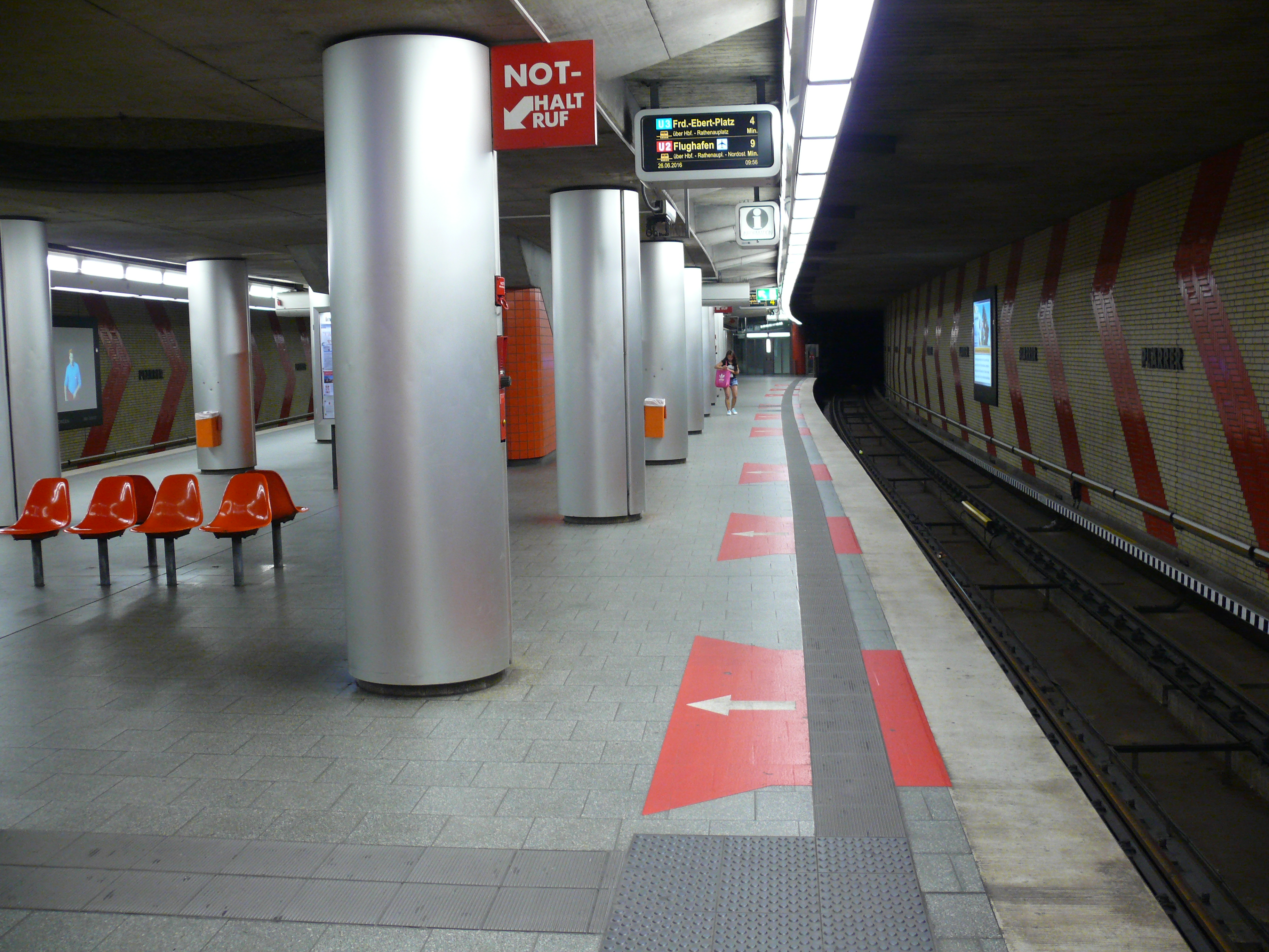 Gleis 4 am U-Bahnhof Plärrer in Nürnberg, auf der Ebene -3.